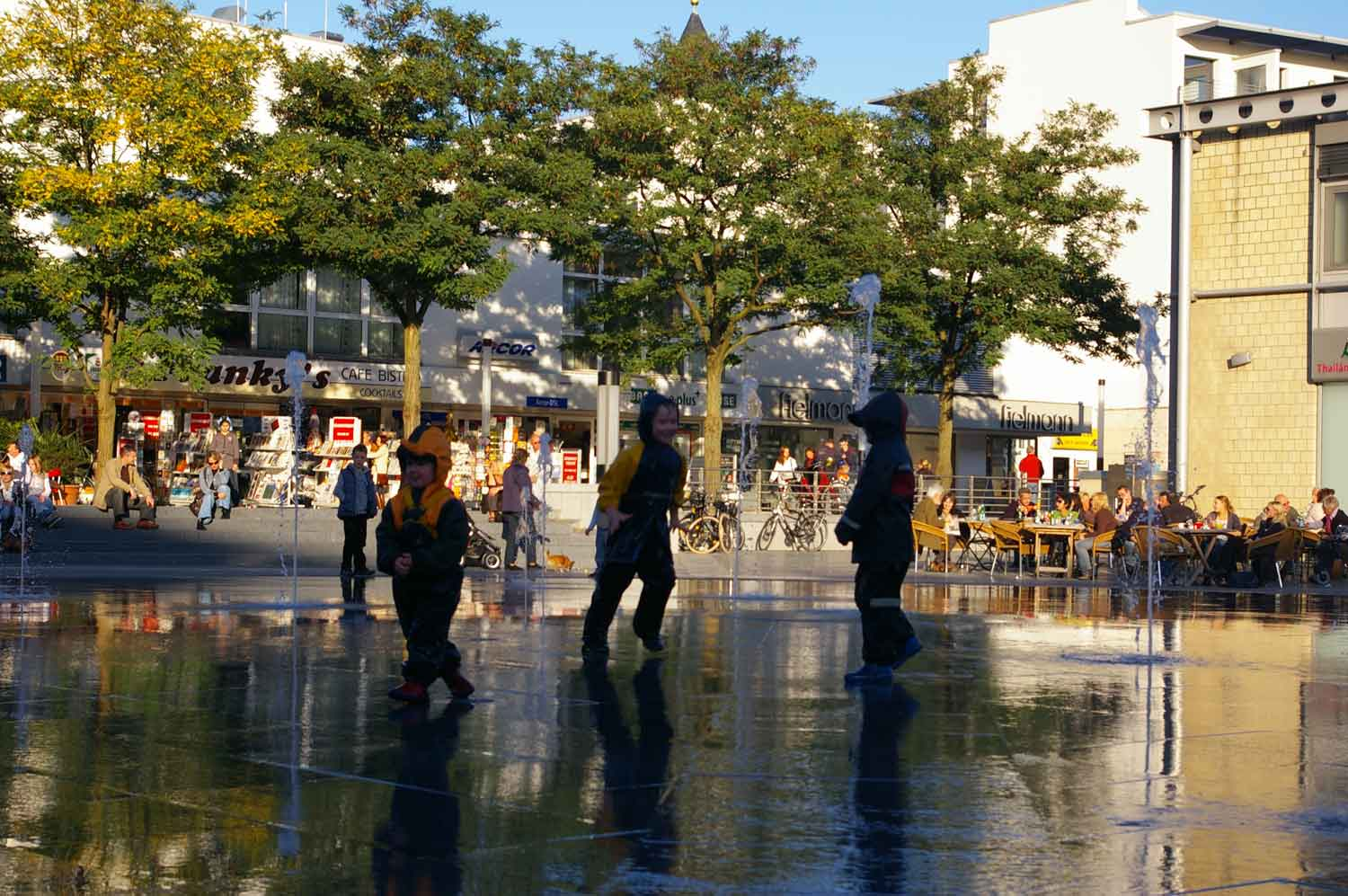 Maktplatzbrunnen Langenfeld